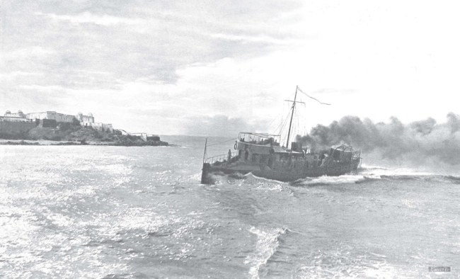 El destructor Terror, en la costa de Larache. Junio de 1911.